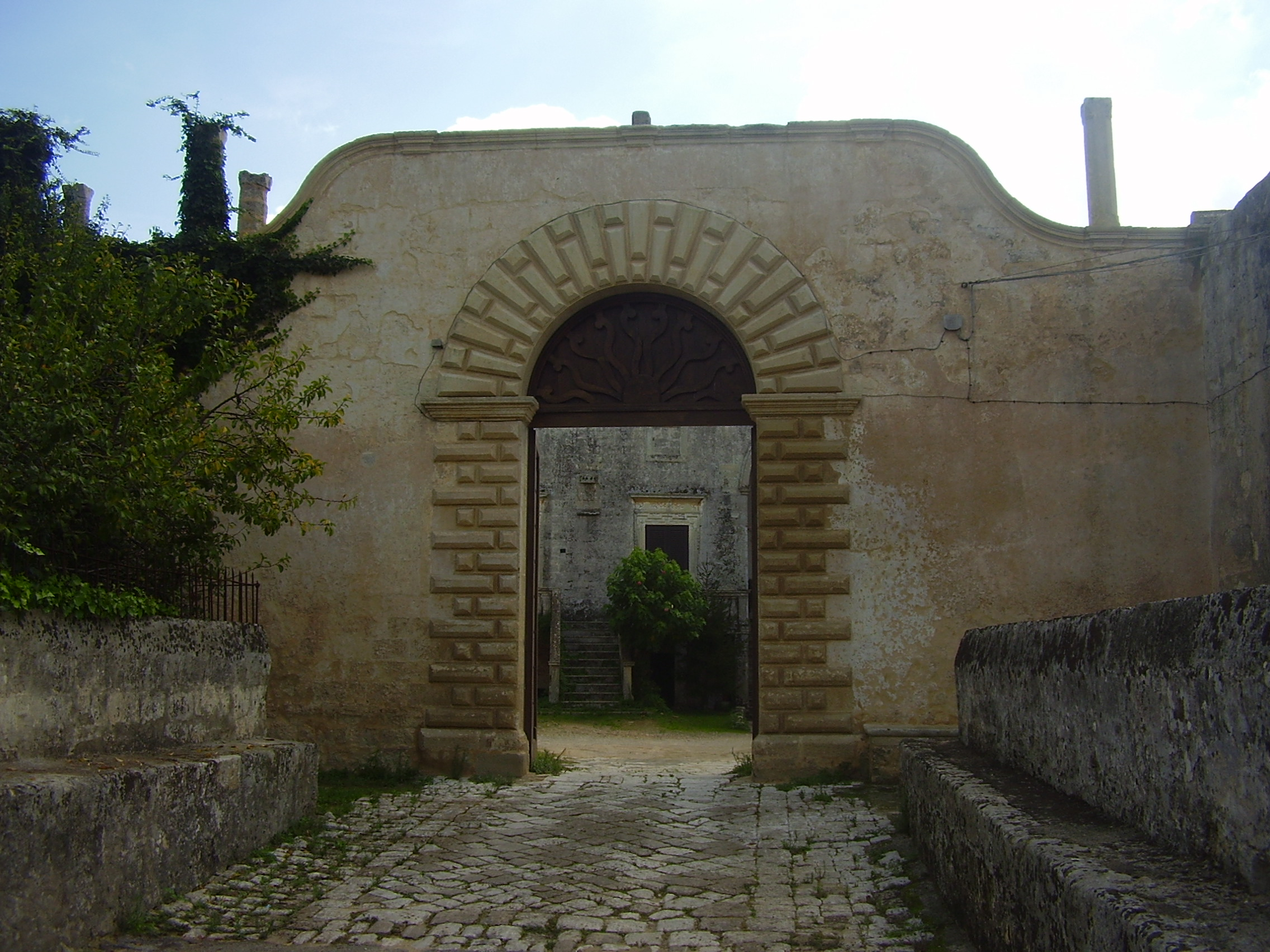 Palazzo Ducale Sanarica, Lecce